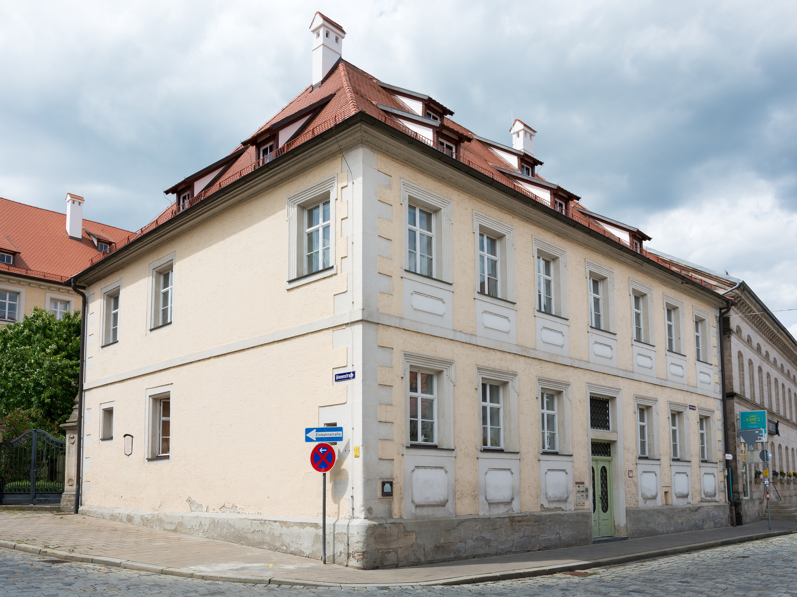 Gebäude Klosterstraße 1 in Kronach.